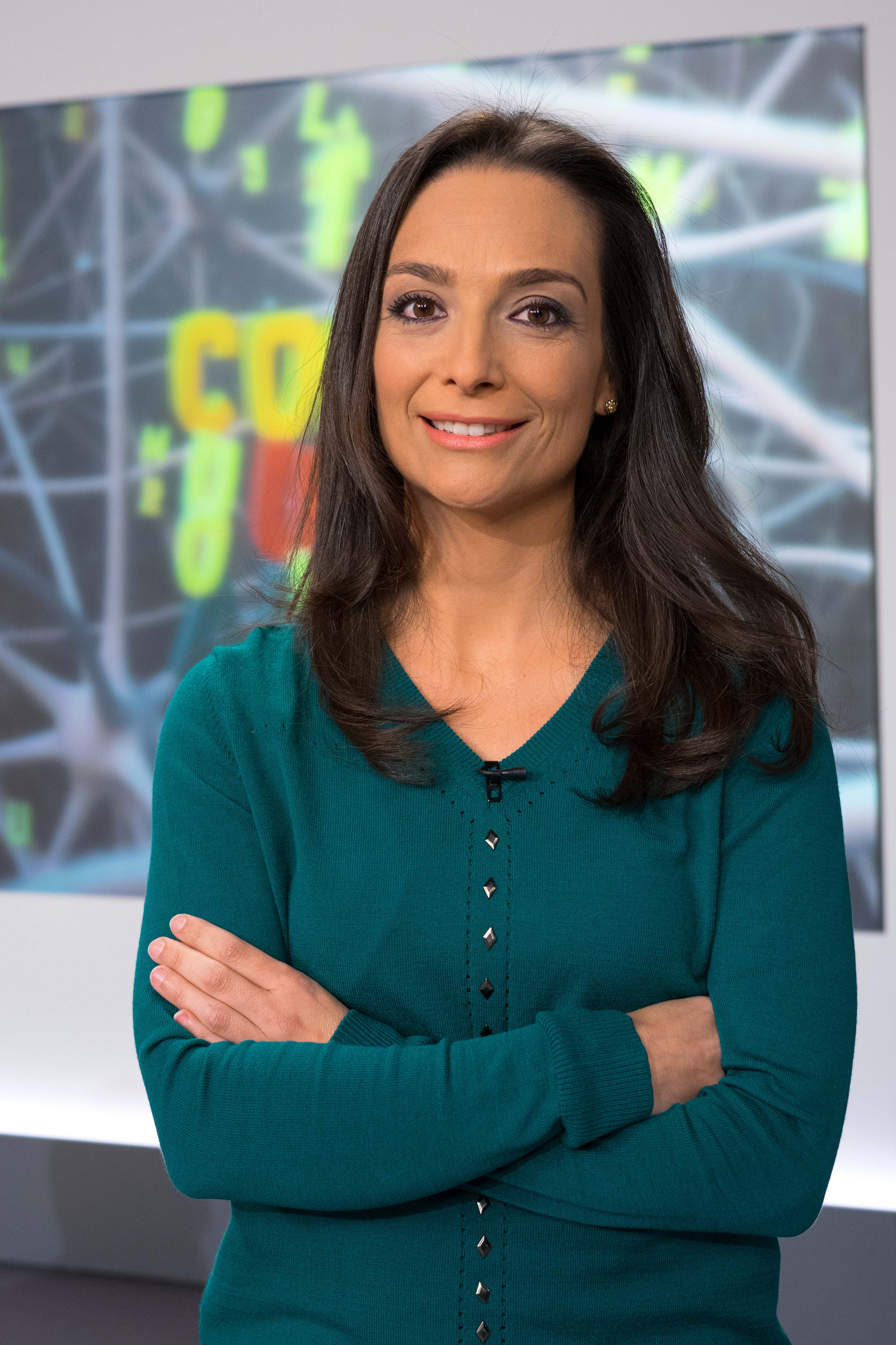 María Canosa no plató do programa Coma Un Allo